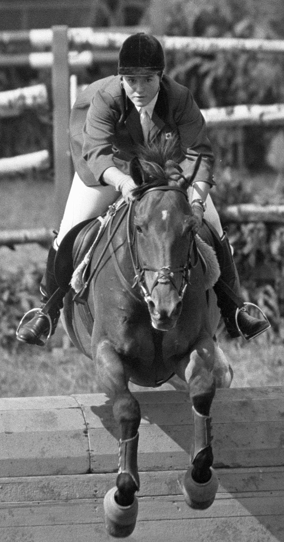 CHIO te Rotterdam: pp + nr. 3 mej. B. Simpson (Canada) won de prijs der Amazones: Mej. Simpson op Australis in aktie; nr. 1 miss Backhouse , nr. 4 miss Ross